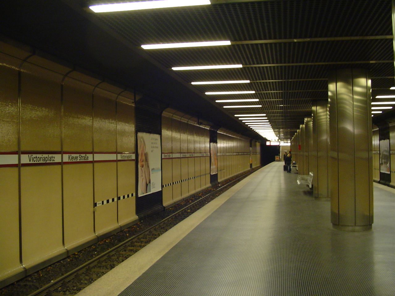 Stadtbahnnetz Rhein-Ruhr, Station Düsseldorf Viktoriaplatz